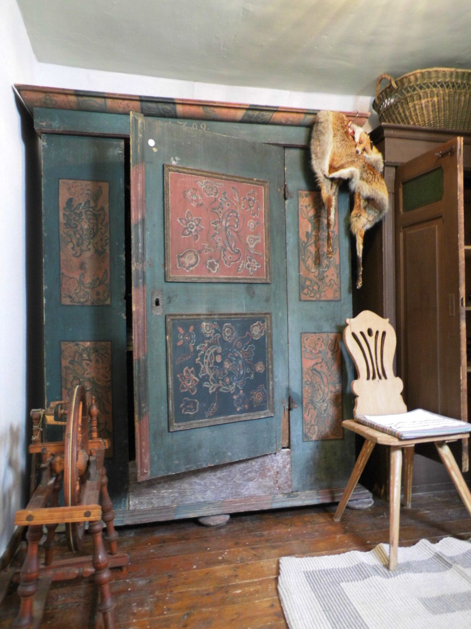 Heimatmuseum Nohra